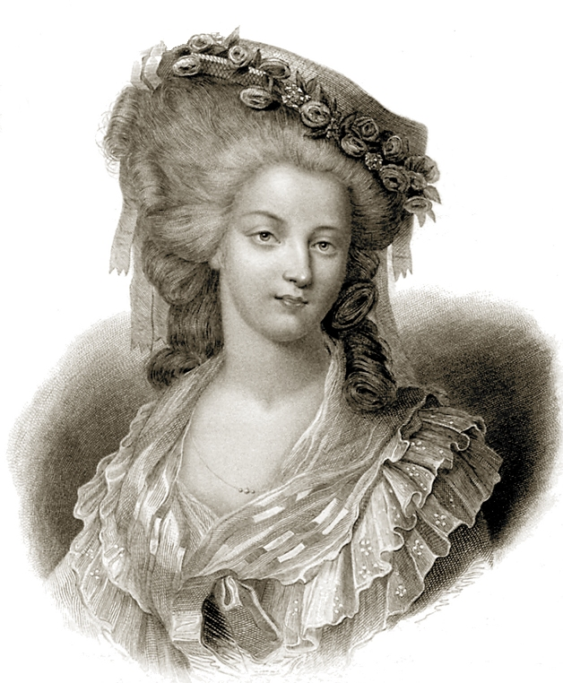 Marie Thérèse Louise von Savoyen-Carignan, princesse de Lamballe (* 8. September 1749 in Turin; † 3. September 1792 in Paris) war eine französische Hofdame und Intendantin des Hauses der Königin Marie Antoinette.